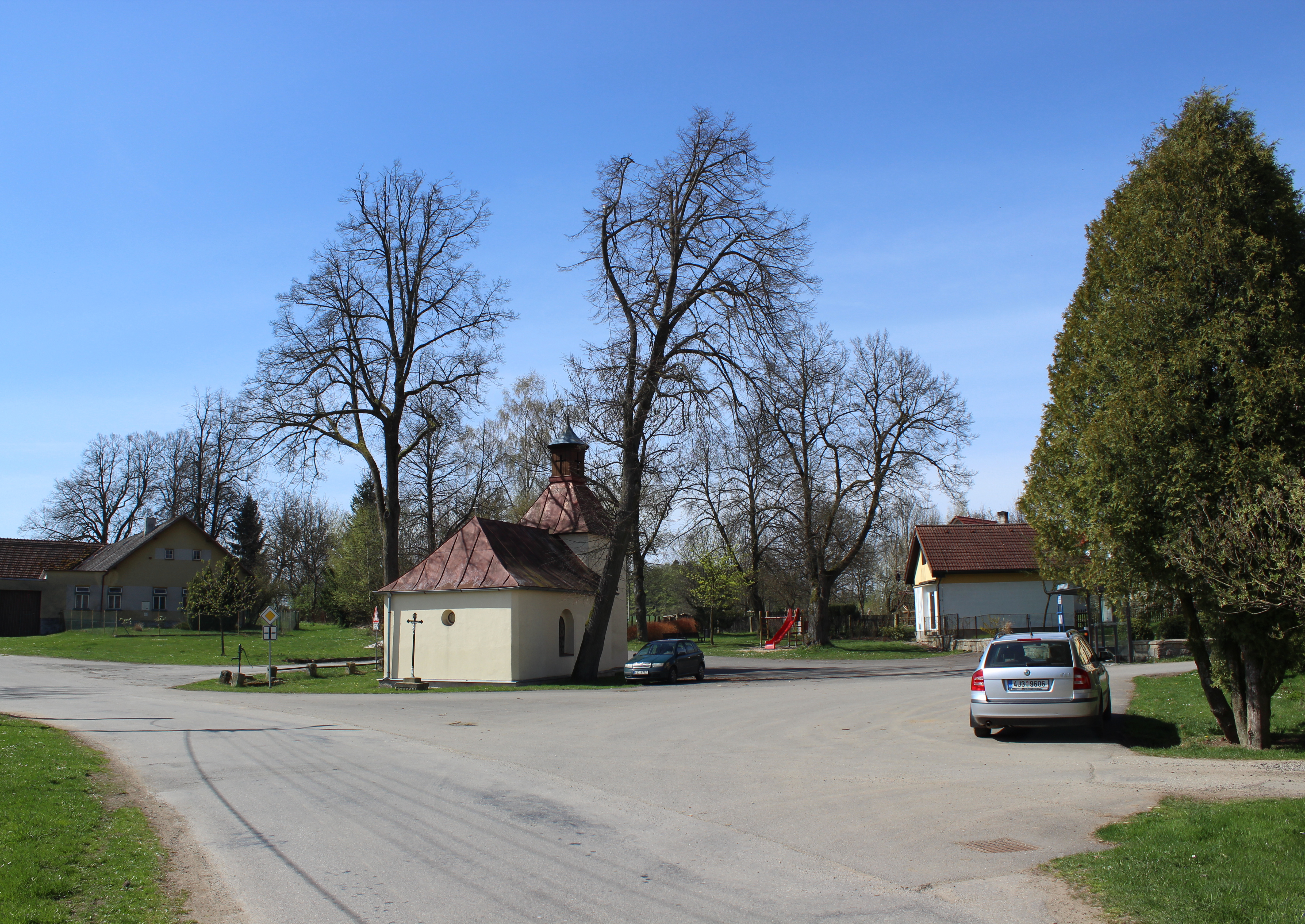 Náves s kapličkou v Dobré Vodě. Project: Fotíme Česko.